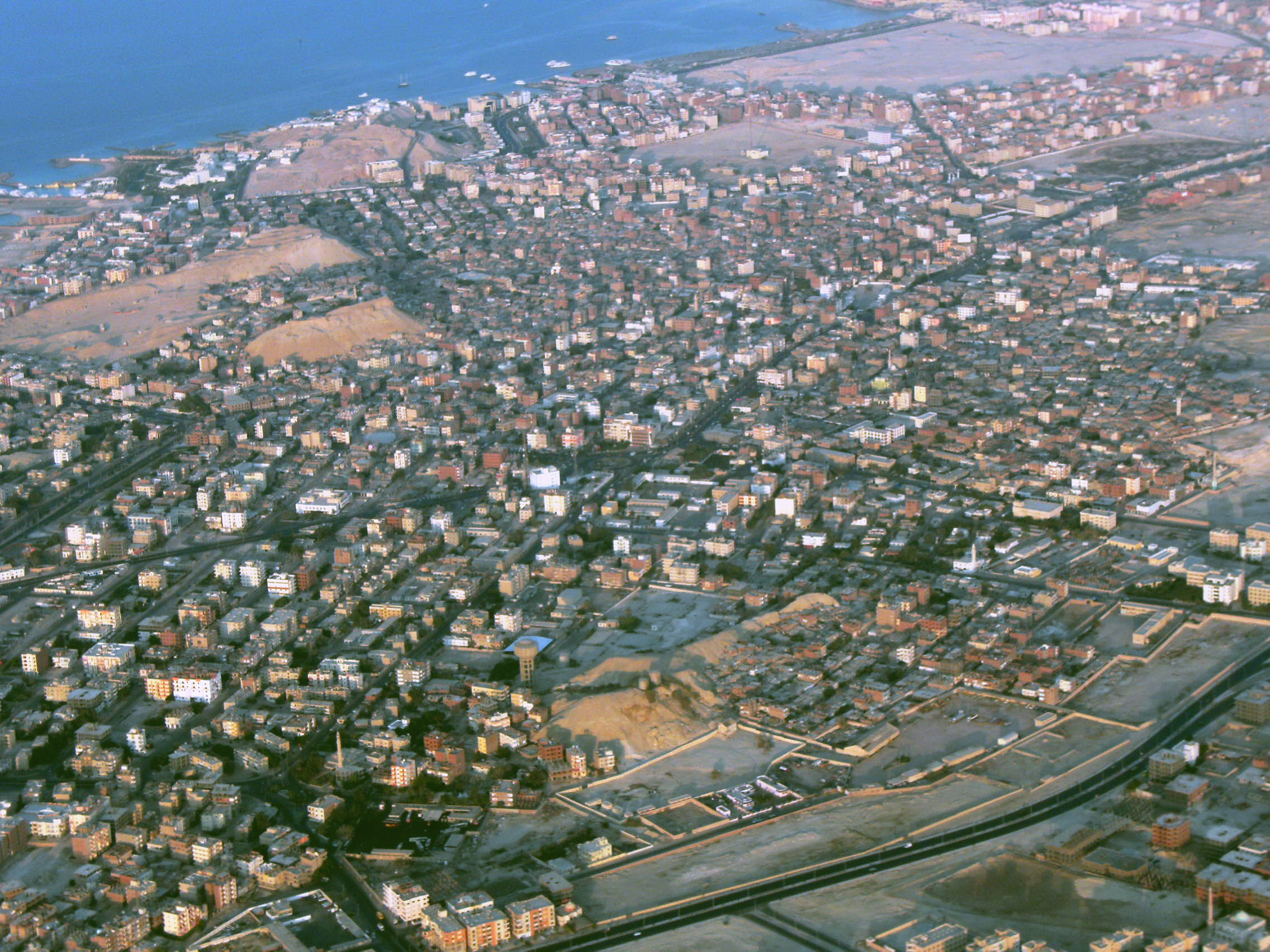 Luftbild von Hurghada - Ägypten